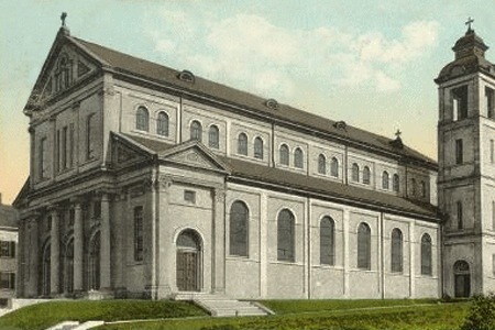 Église du Saint-Nom de Providence (Rhode Island). Ancienne carte postale des années 1910.